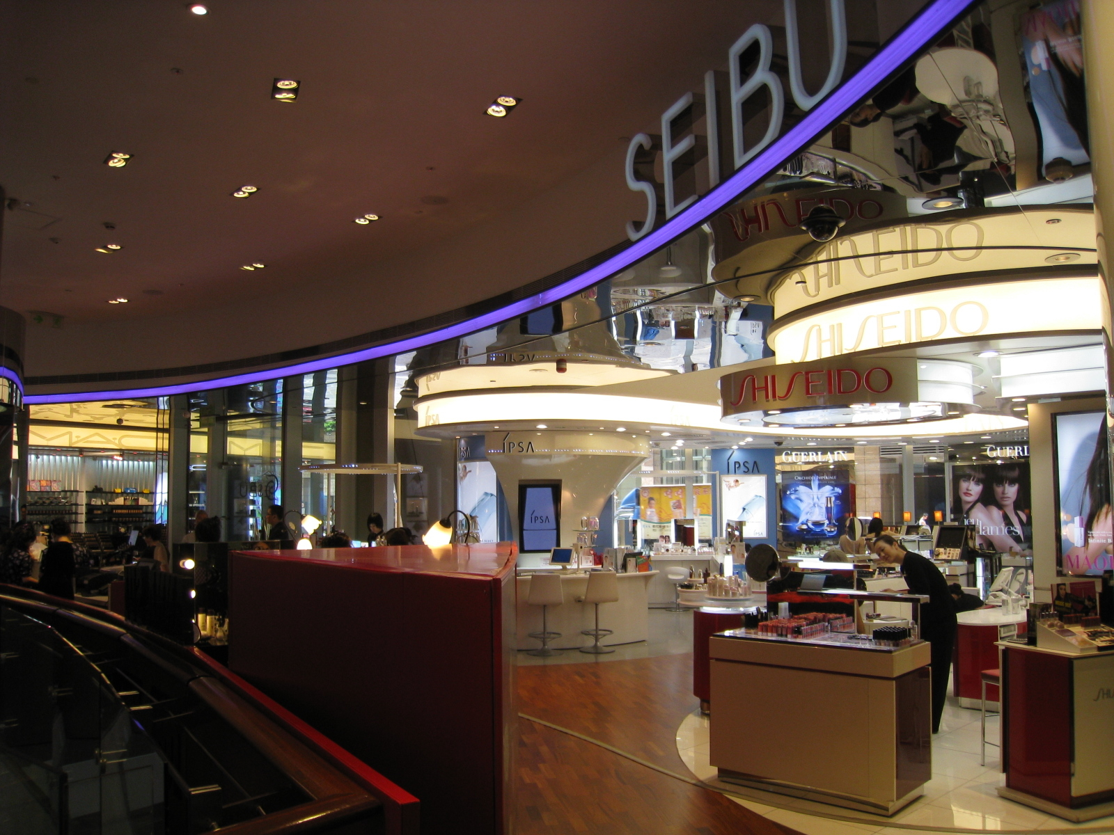 Langham Place Seibu